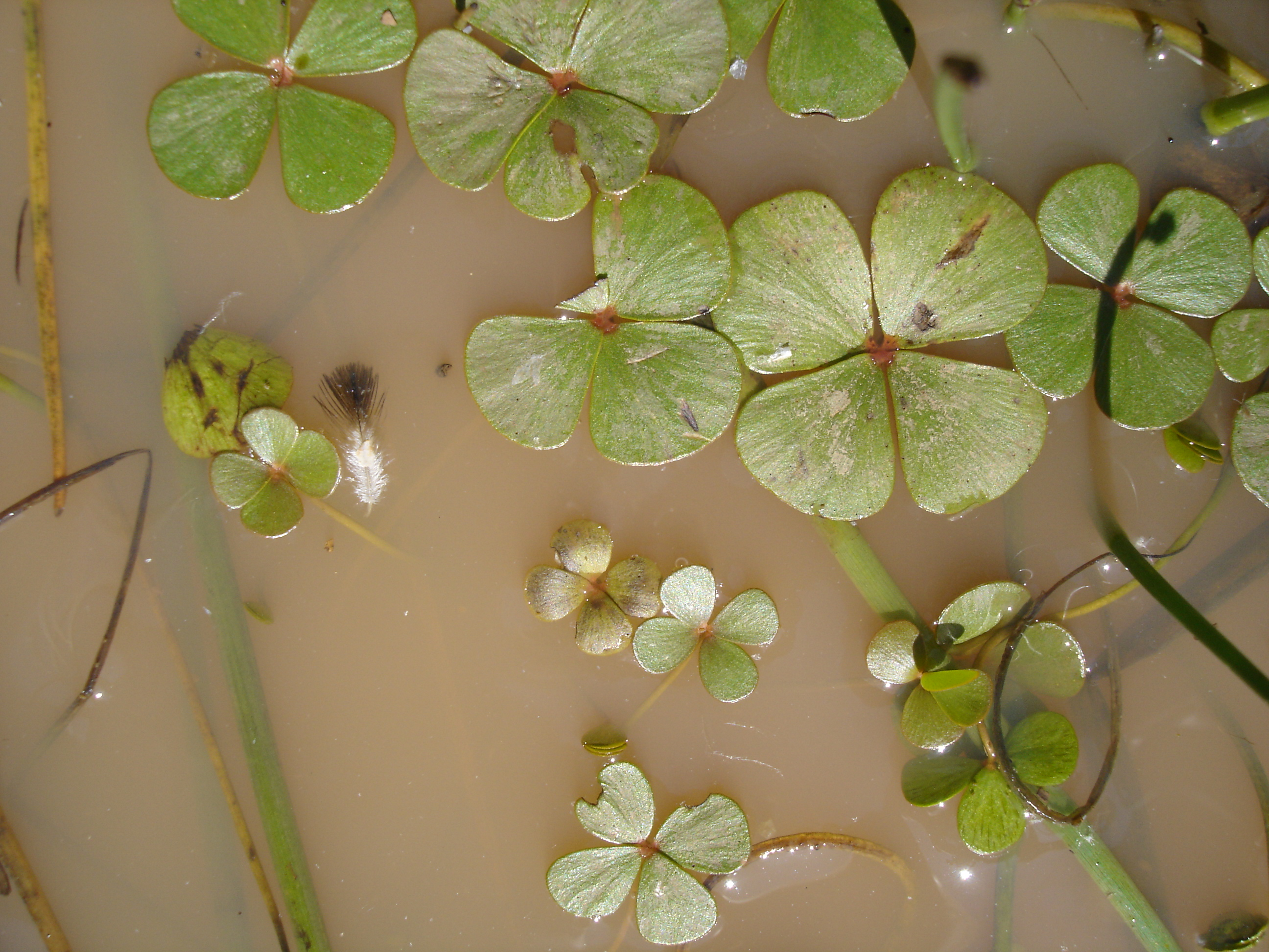 Helecho